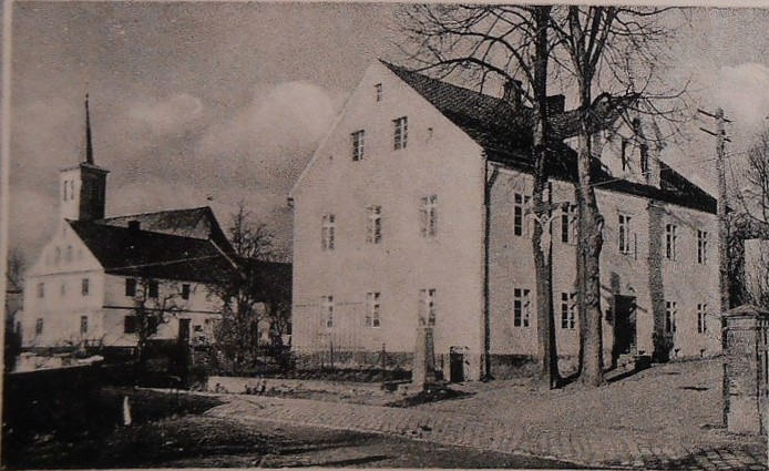 Wielopolowa pocztówka z Szybowic.